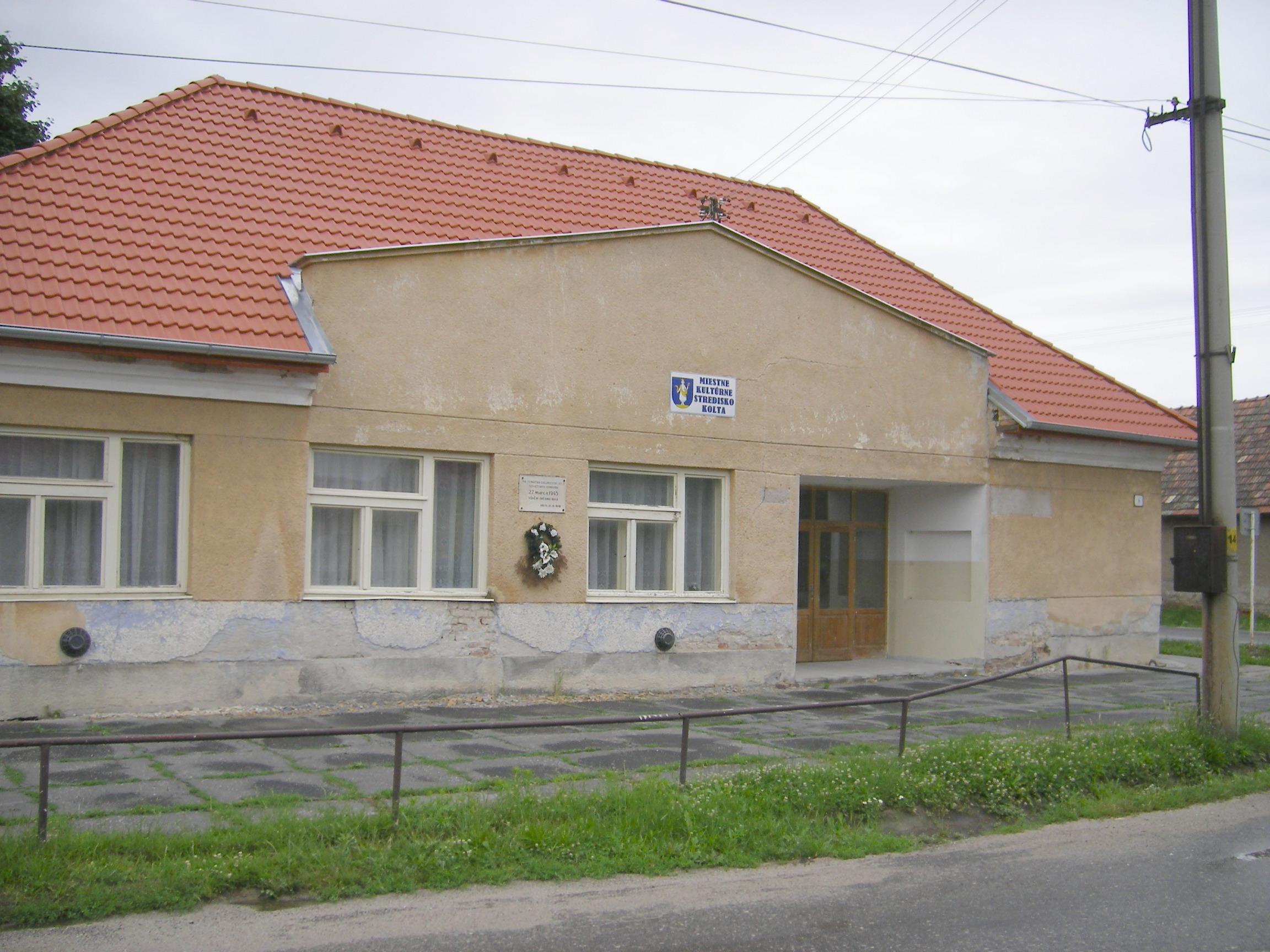 Kolta - kultúrház